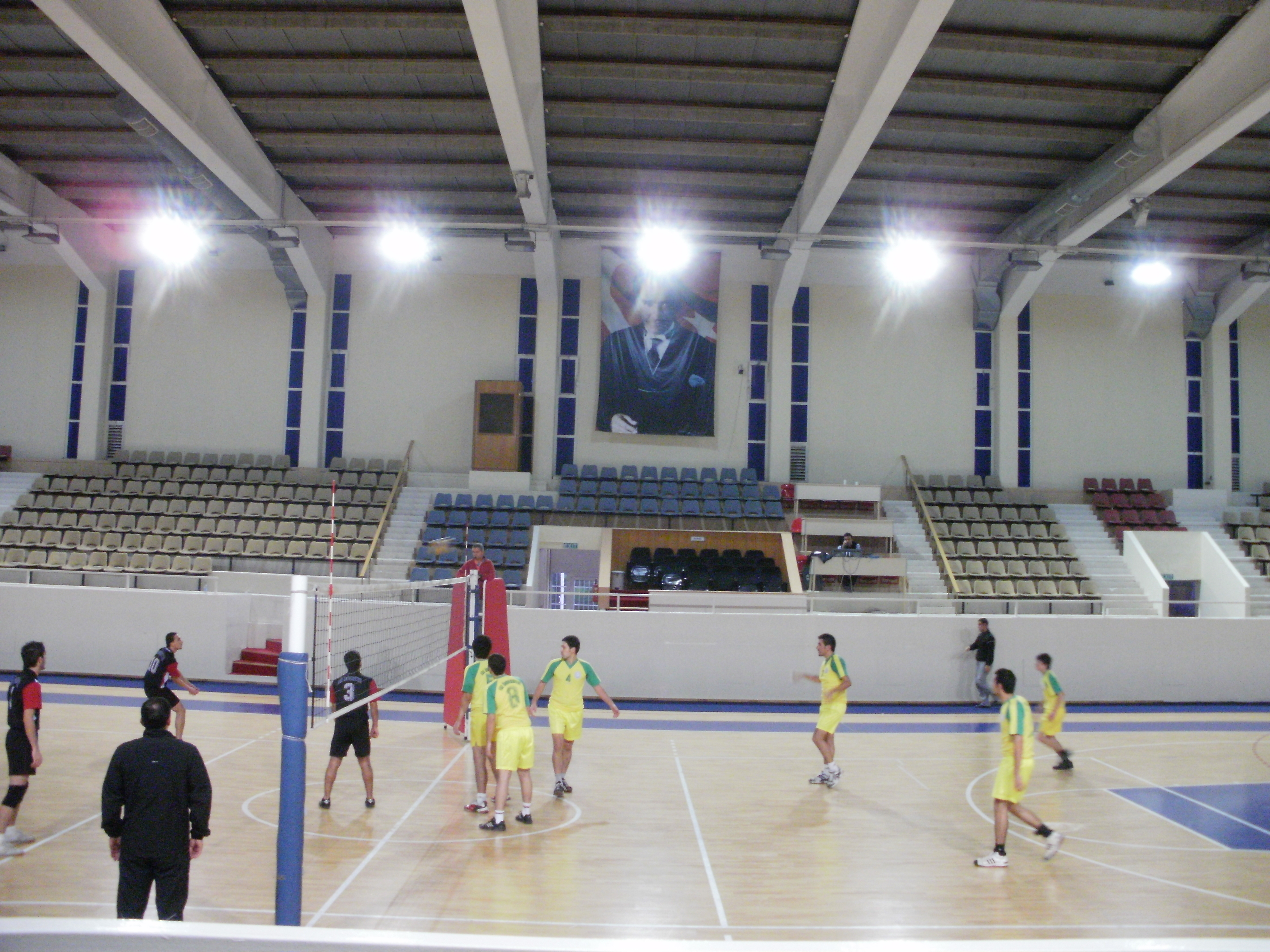 Ege Üniversitesi spor salonu